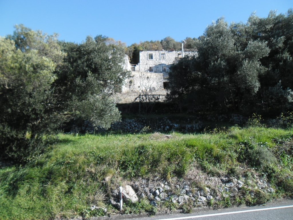 selo Kručica